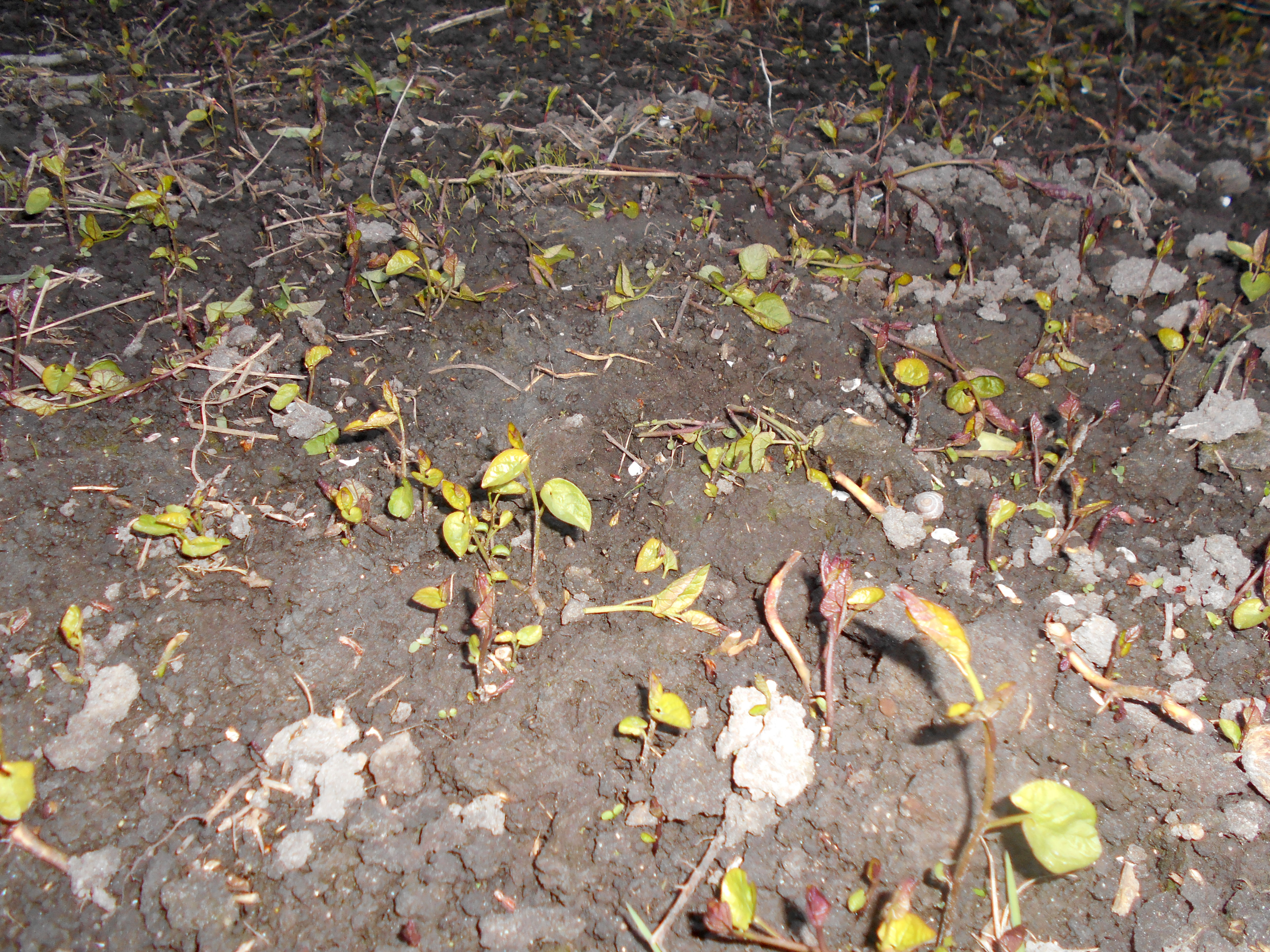 Kielisznik zaroślowy (Calystegia sepium).